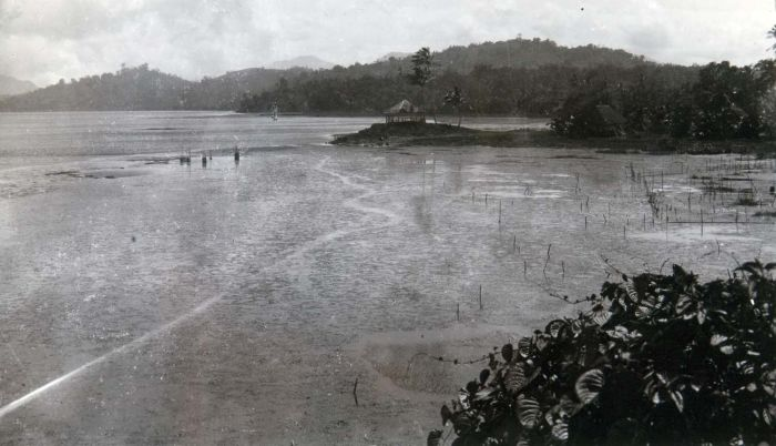 Foto. Meer van Tondano bij Kakas